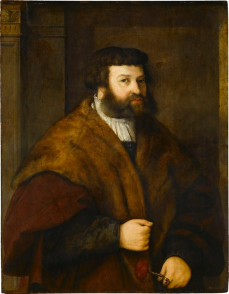 Christoph Amberger, Porträt des Jörg Hermann